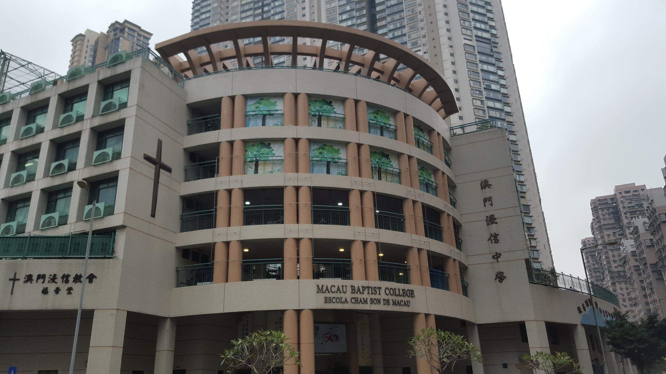 Escola Cham Son de Macau